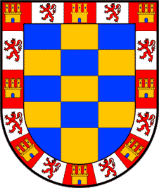 Escudo de armas de la familia Portocarrero, condes de Montijo